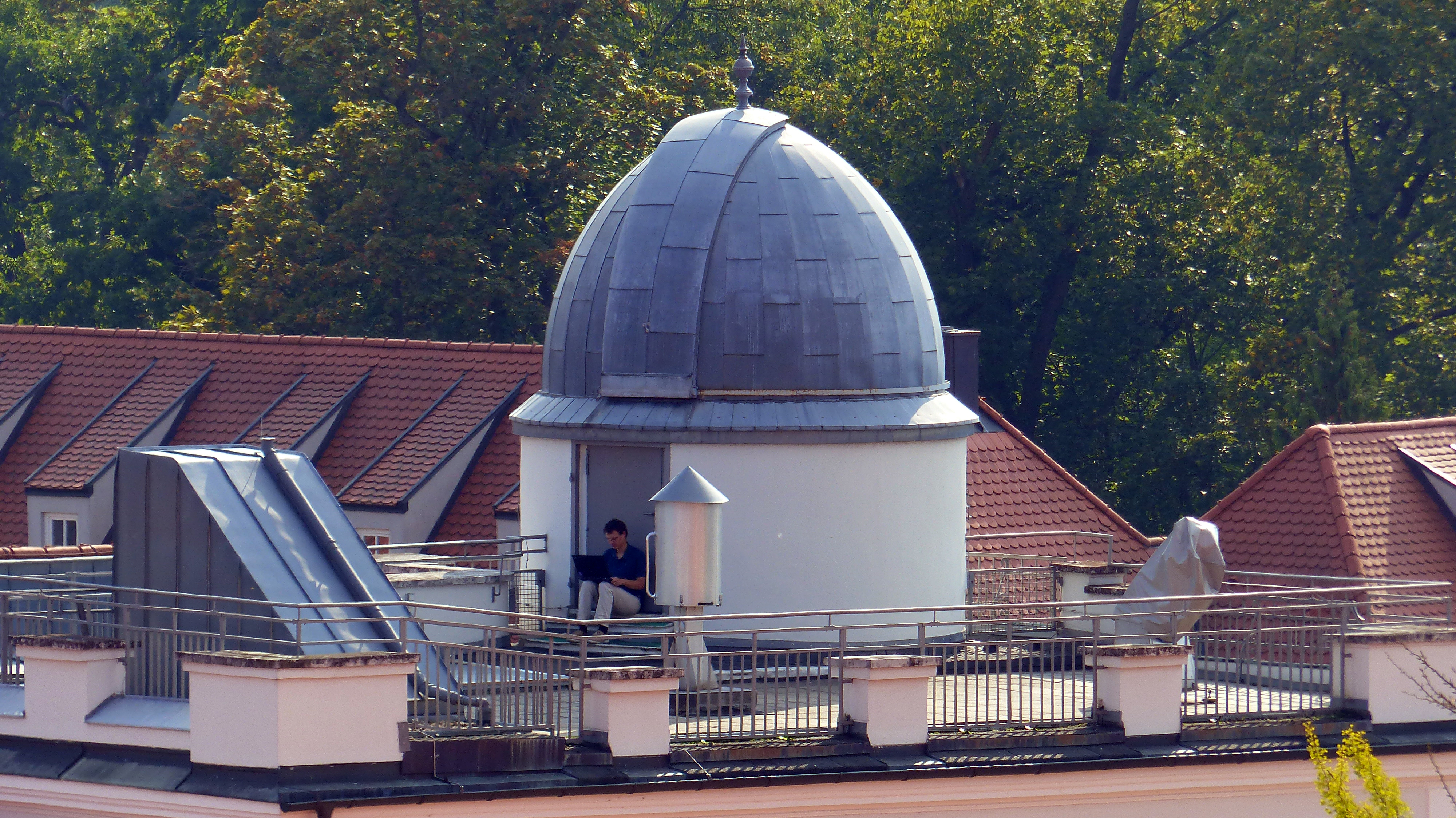 Blick auf die Regensburger Volkssternwarte, vom Turm der Dreieinigkeitskirche ausThis is a photograph of an architectural monument.